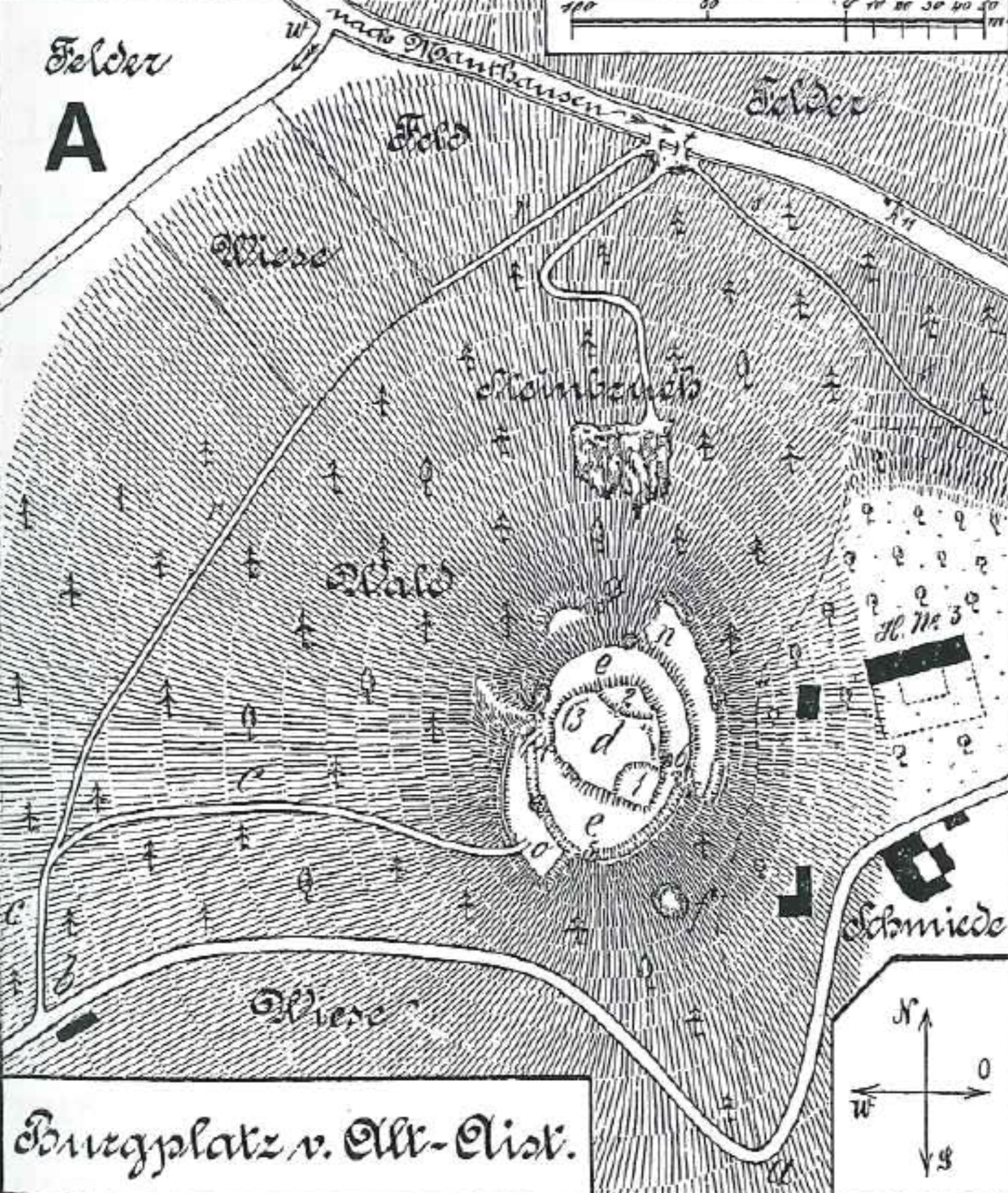 Planskizze von Burg Altaist von Ludwig Benesch